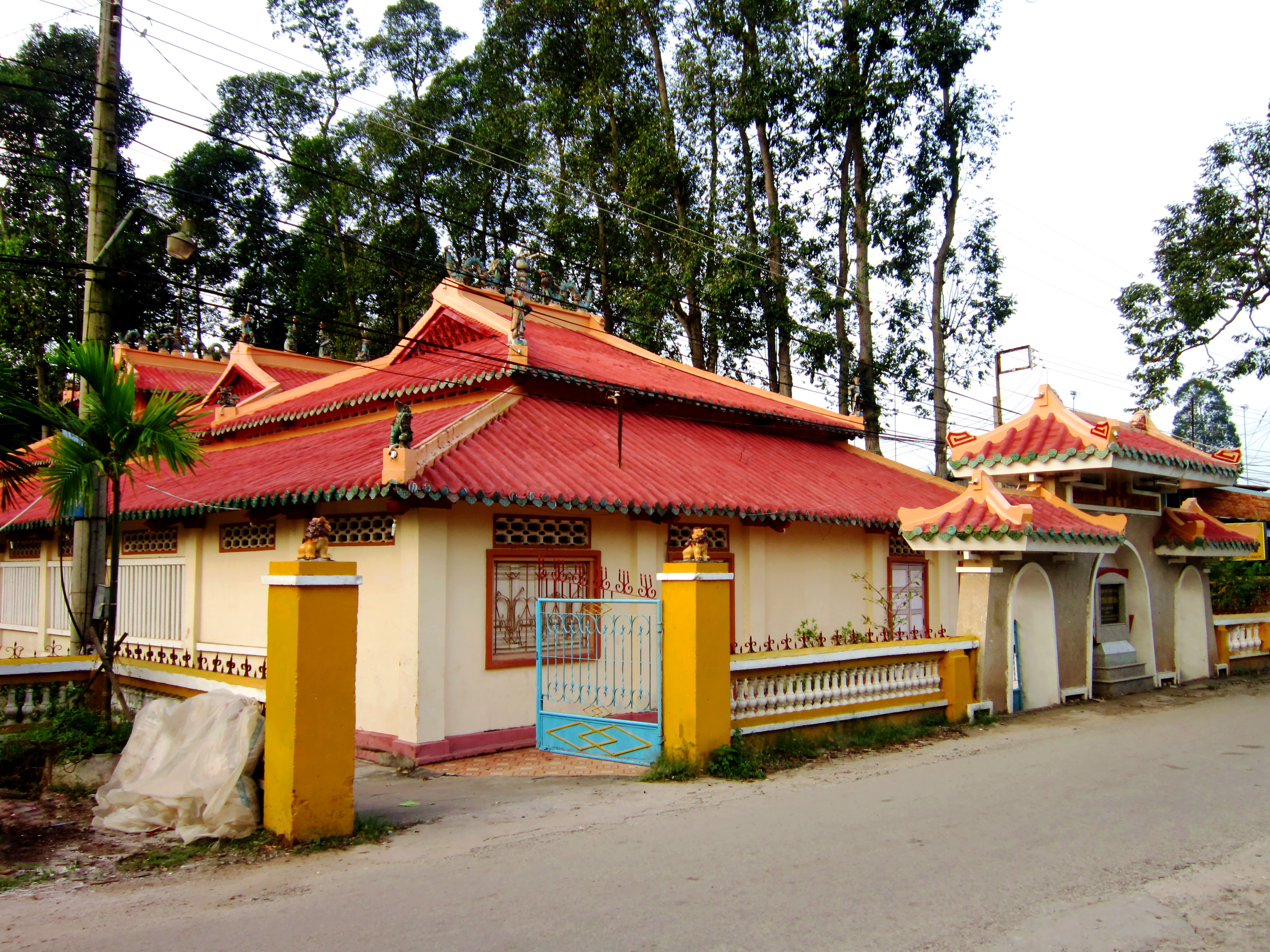 Đình Bình Hòa ở xã Bình Hòa, huyện Châu Thành, tỉnh An Giang, Việt Nam. Ngày 10 tháng 10 năm 2008, ngôi đình được xếp hạng là di tích Kiến trúc Nghệ thuật cấp tỉnh.